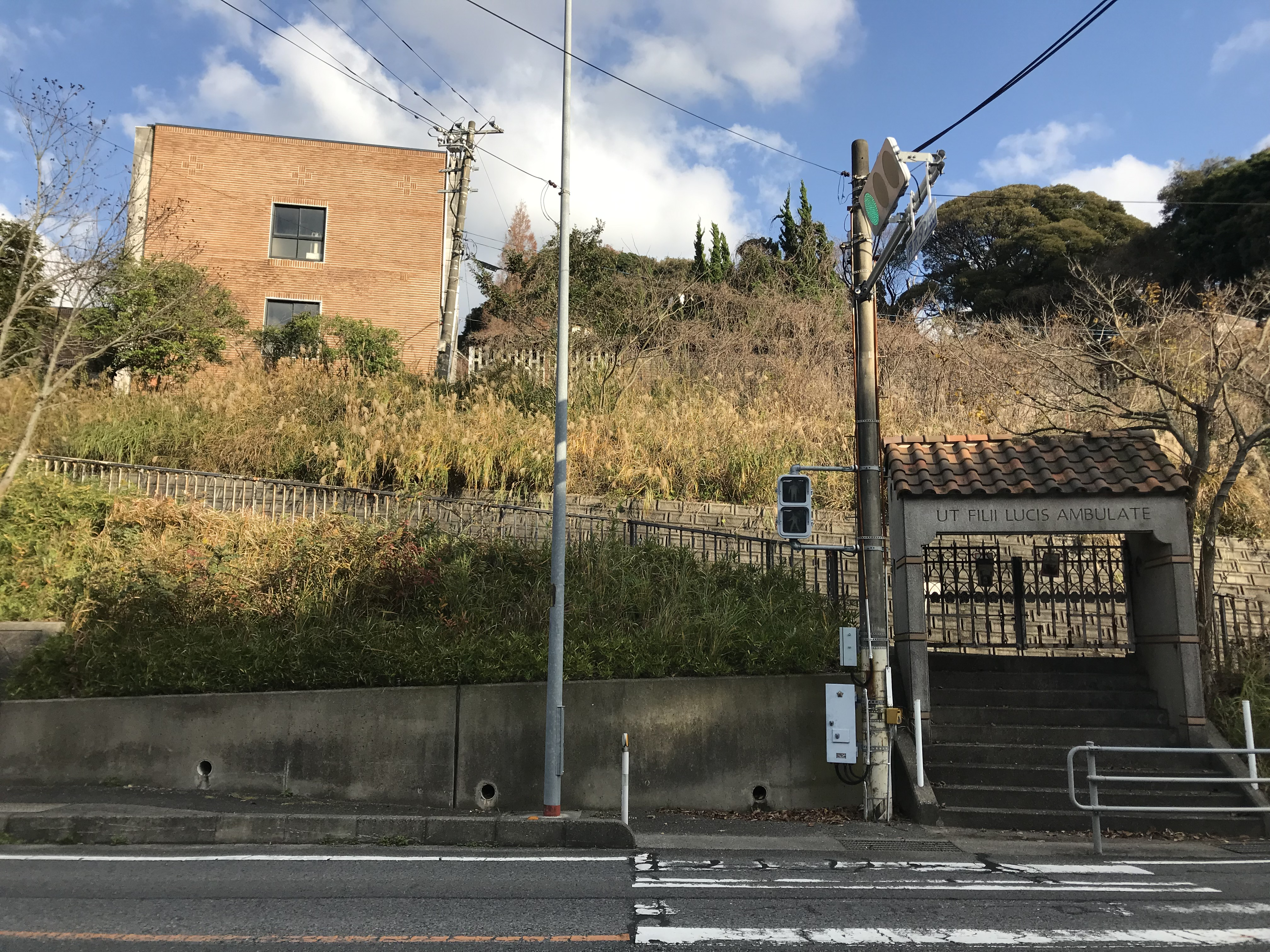 梅ヶ峠駅前の梅光女学院大学梅ヶ峠キャンパス